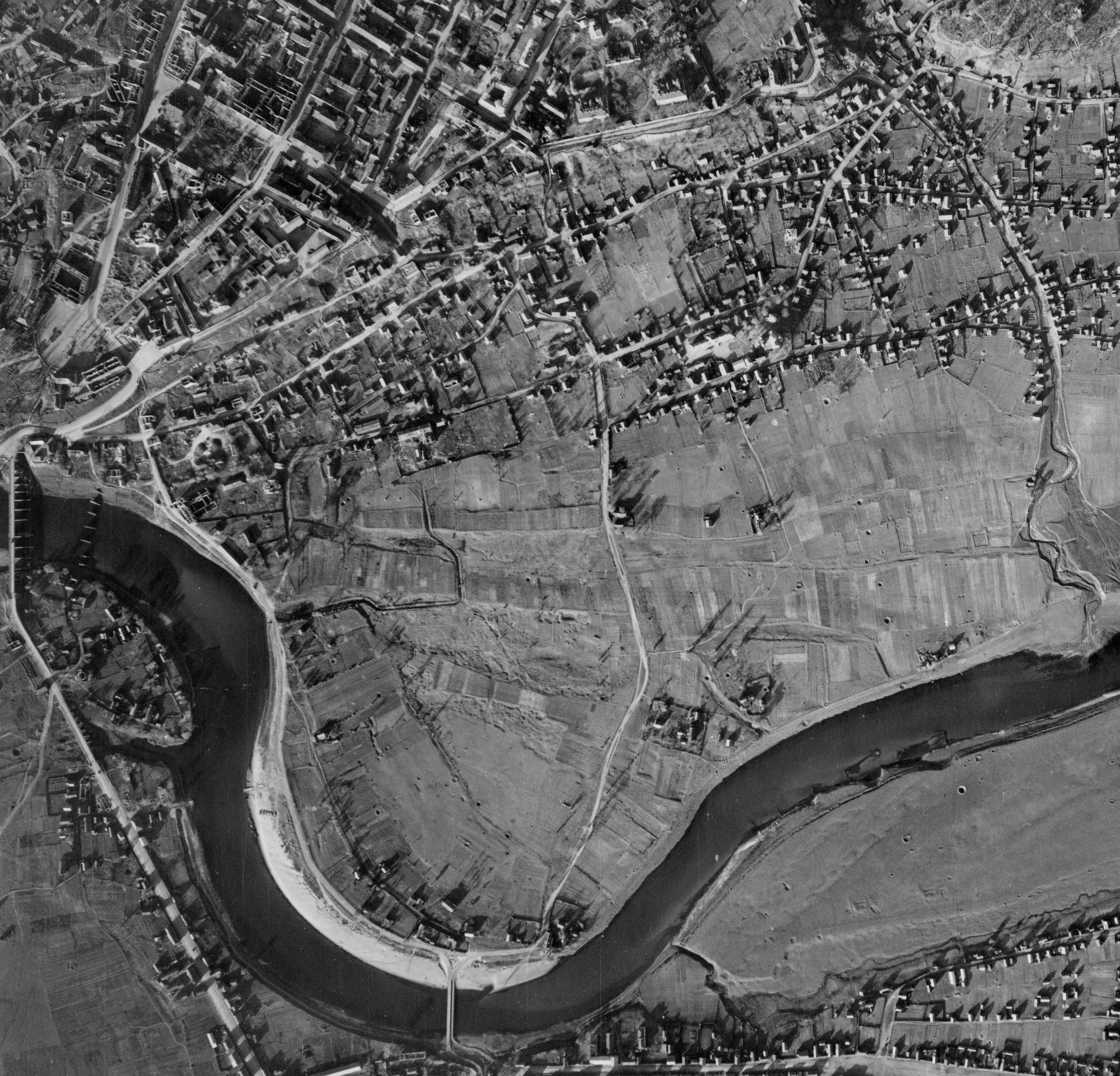 Магілёў. Нямецкі аэрафотаздымак